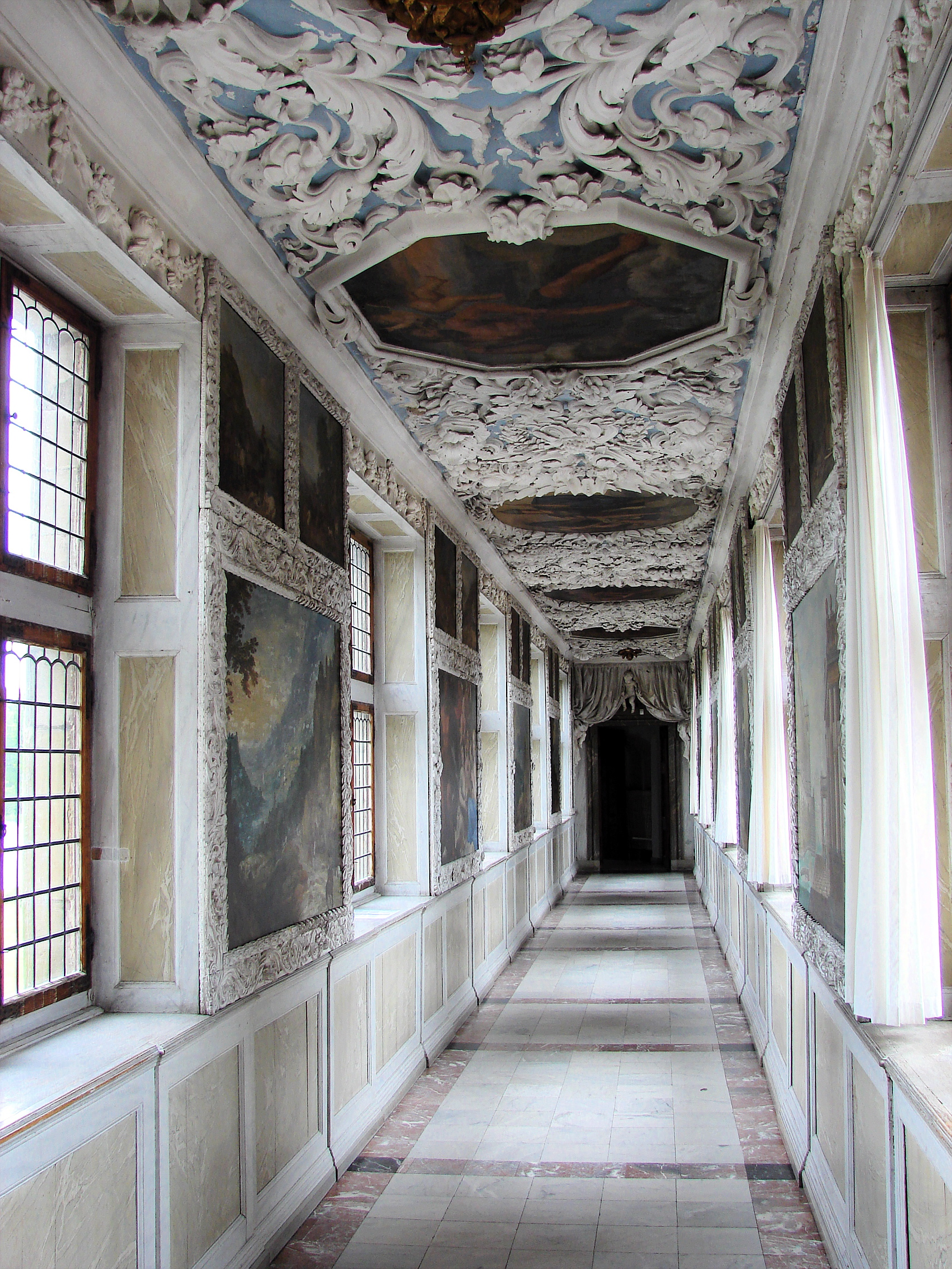 Løngangen på Frederiksborg Slot, set fra Audienssalen, Lambert van Haven (1630-95)